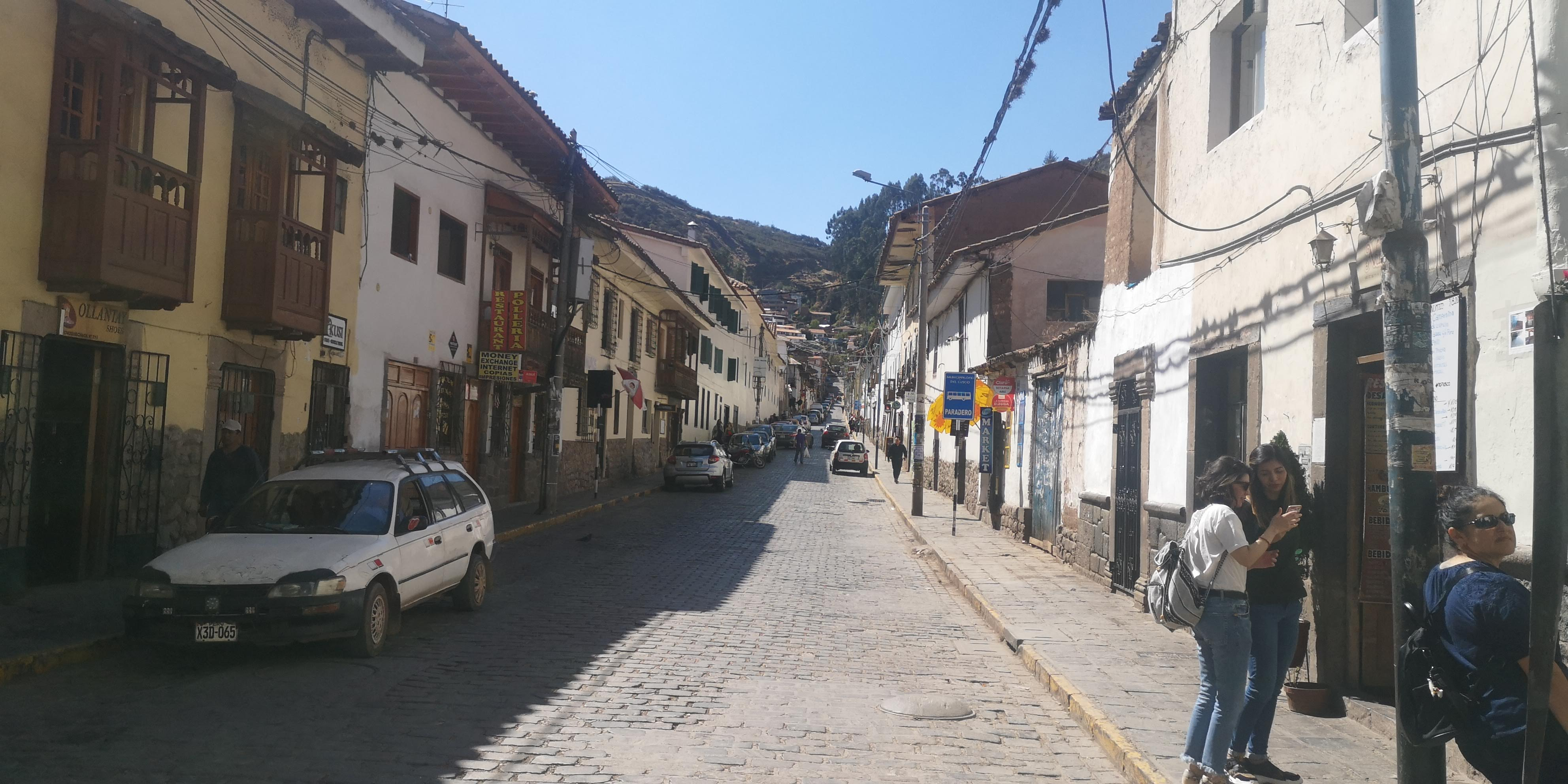 Vista de la calle Choquechaka desde la Cuesta de San Blas en Cusco, Perú